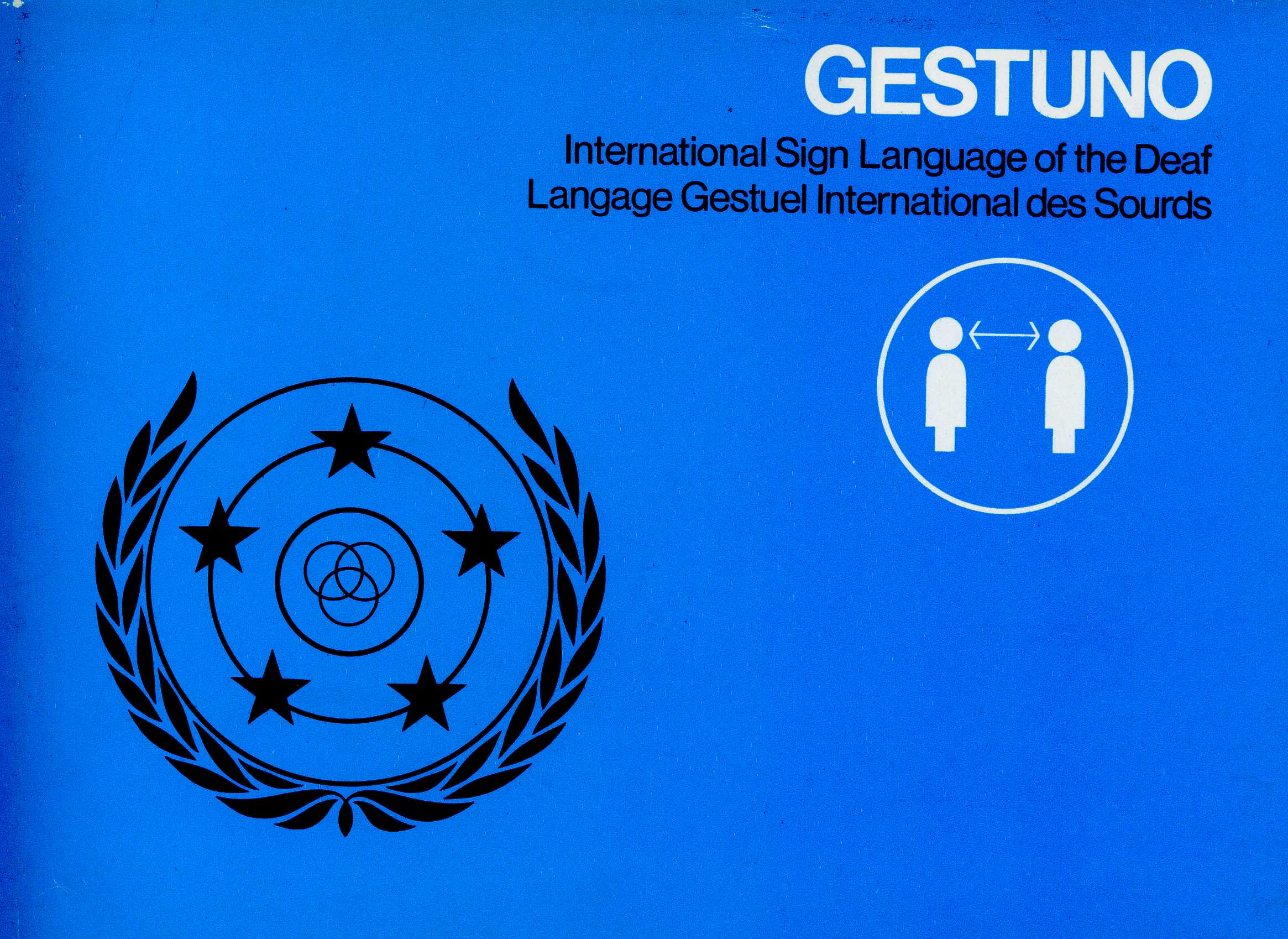 "Жестуно: Міжародна жестова мова глухих" . Обкладинка